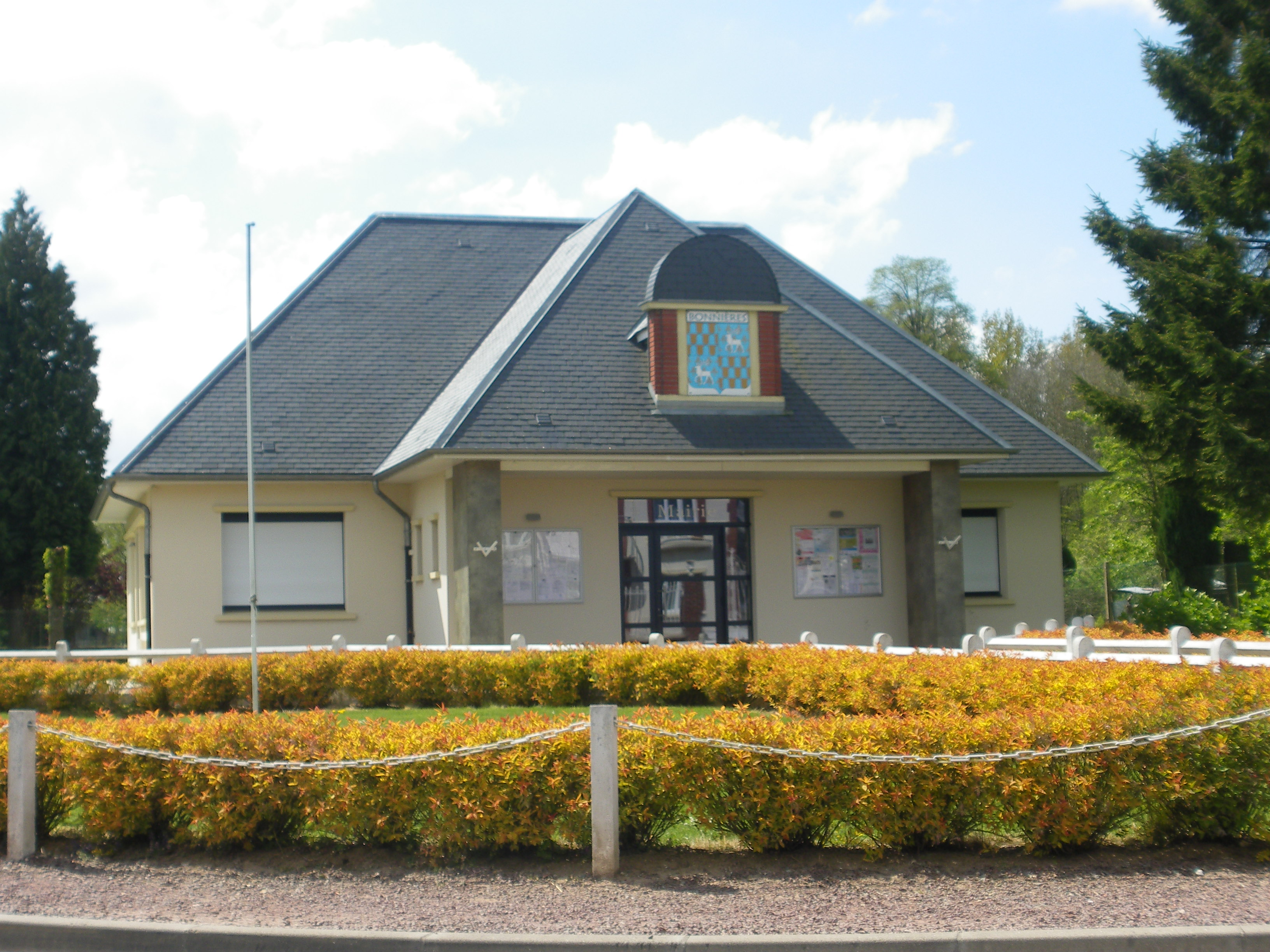 Vue de la mairie de Bonnières, dans le Pas-de-Calais.